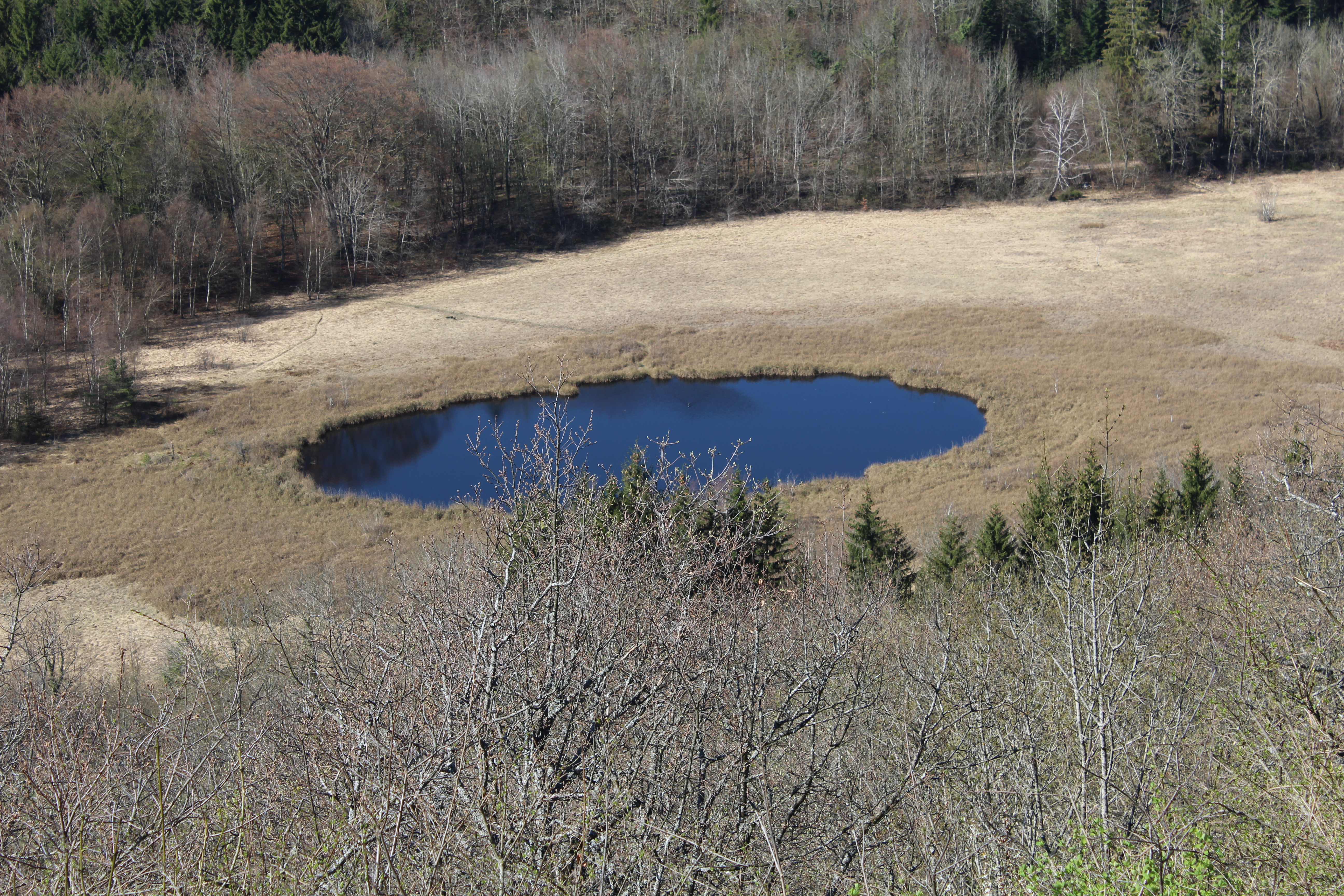 Tourbière de Cerin, Marchamp.